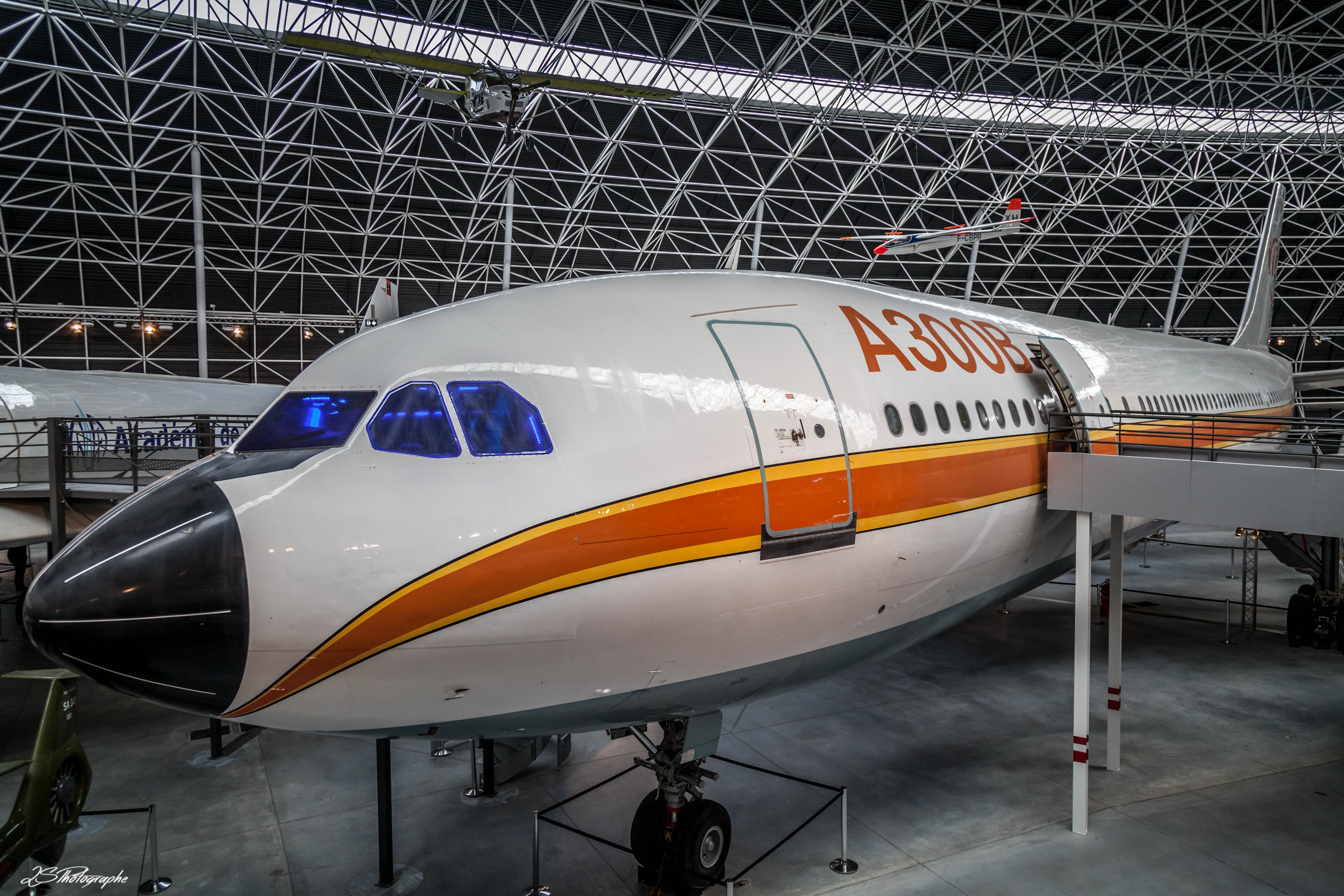 AIRBUS A 300 B